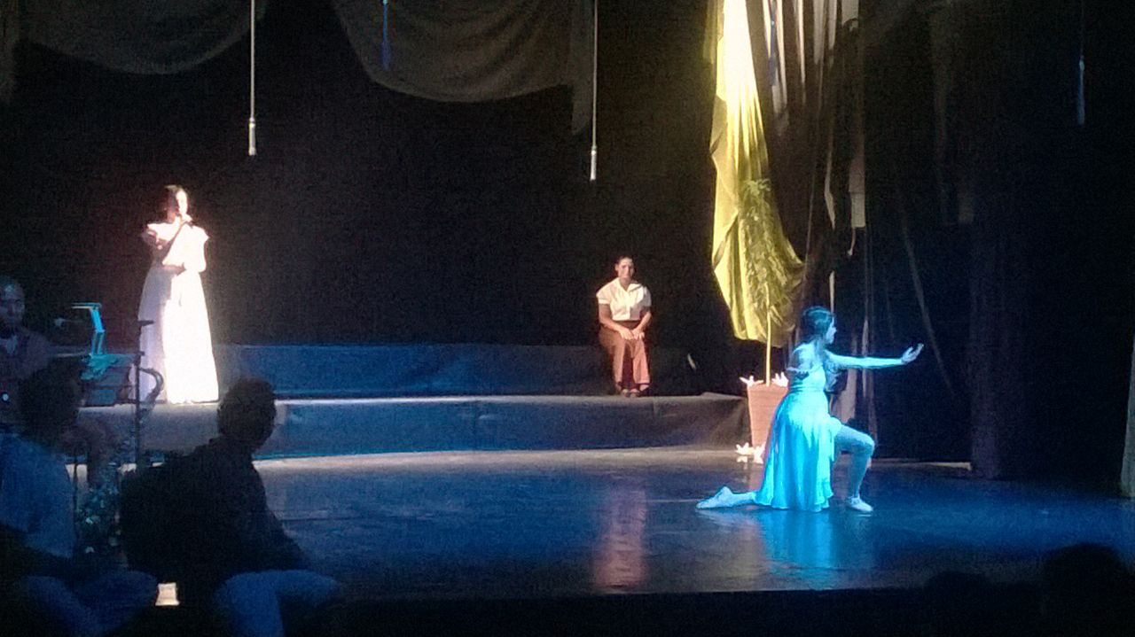 Teatrajha omagho al Auta de Souza